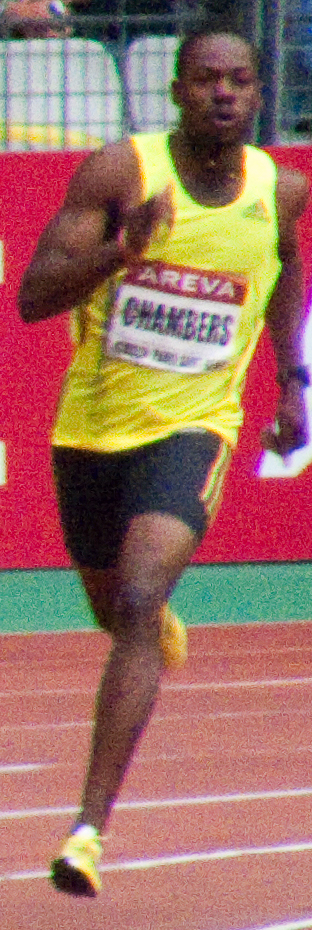 Ricardo Chambers (JAM) sur le 400 m du Meeting Areva 2009 à Saint-Denis.